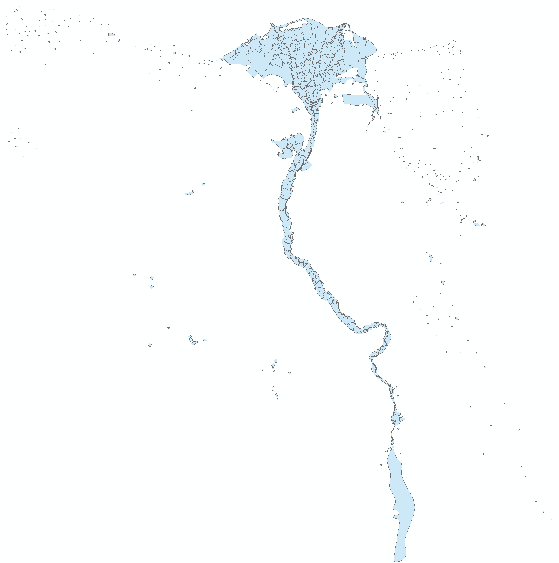 خريطة مراكز مصر.